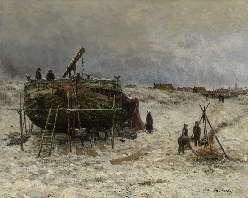 Het schilderij Breeuwen van de schilder Hendrik Willem Mesdag in de collectie van museum De Mesdag Collectie.